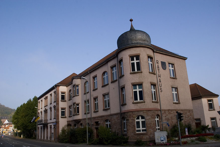 Landstuhl Rathaus